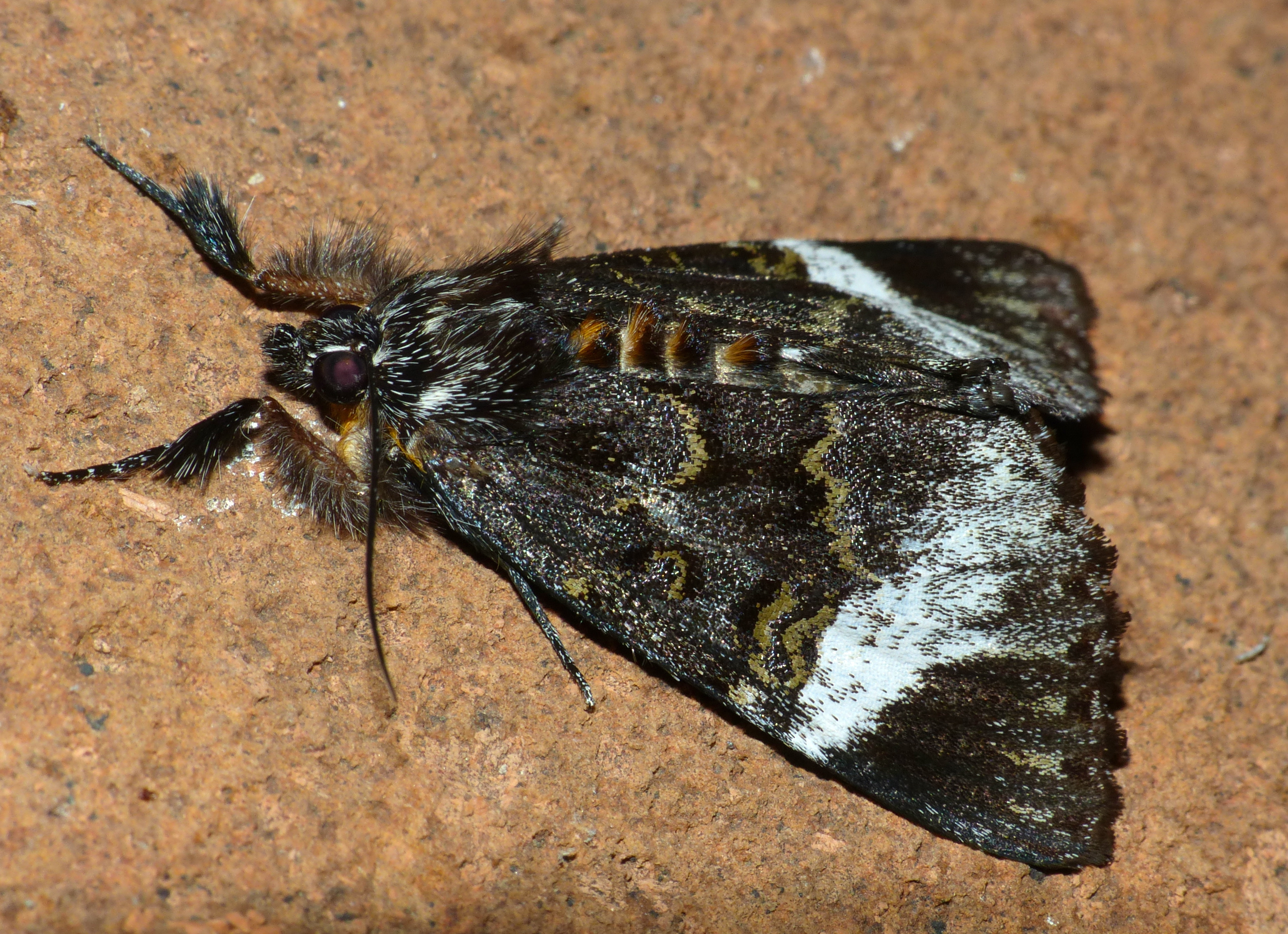 Bungalow N°51, Mopani Camp, Kruger NP, SOUTH AFRICA